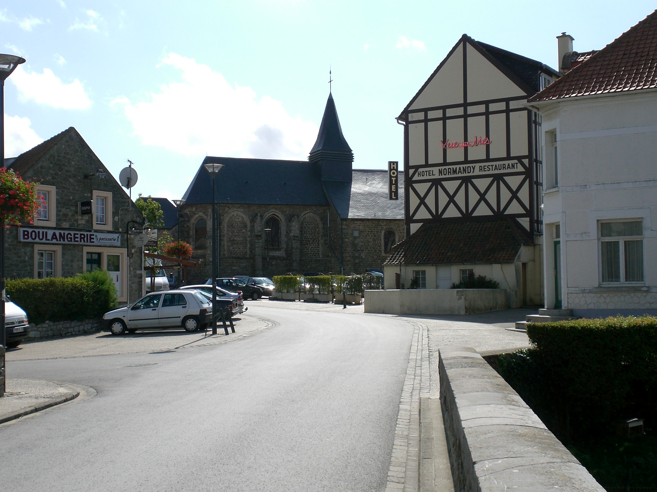 Centre de Wissant avec son église et différents commerces.